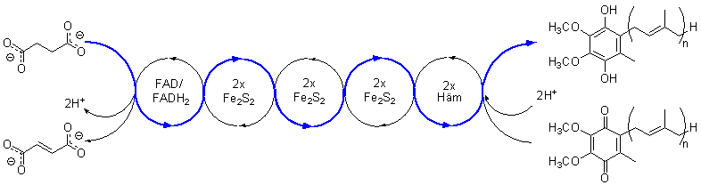 Mechanismus des Oxidation des Succinats durch den Komplex II der Atmungskette